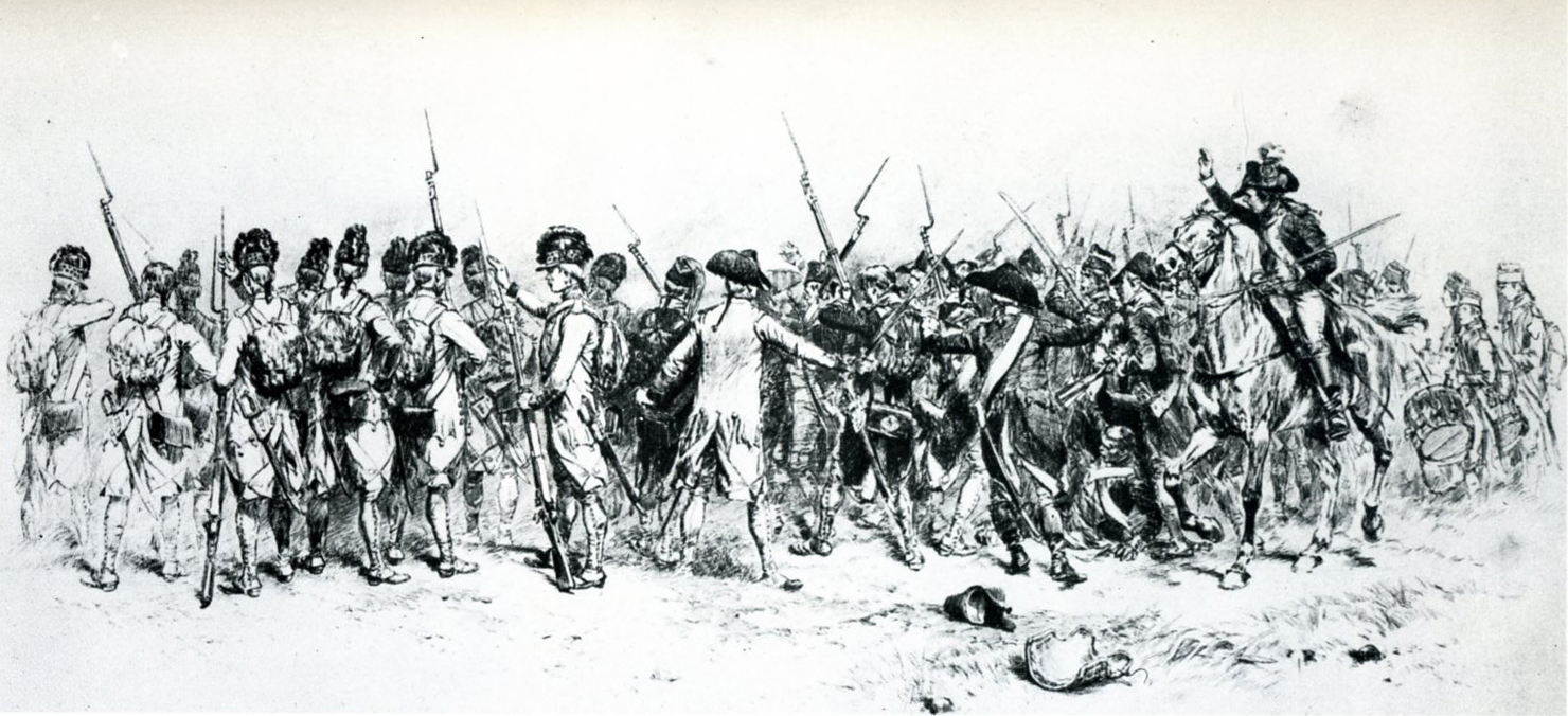 Habits blancs et habits bleus, Amalgame des anciens soldats de l'armée royale et des volontaires et